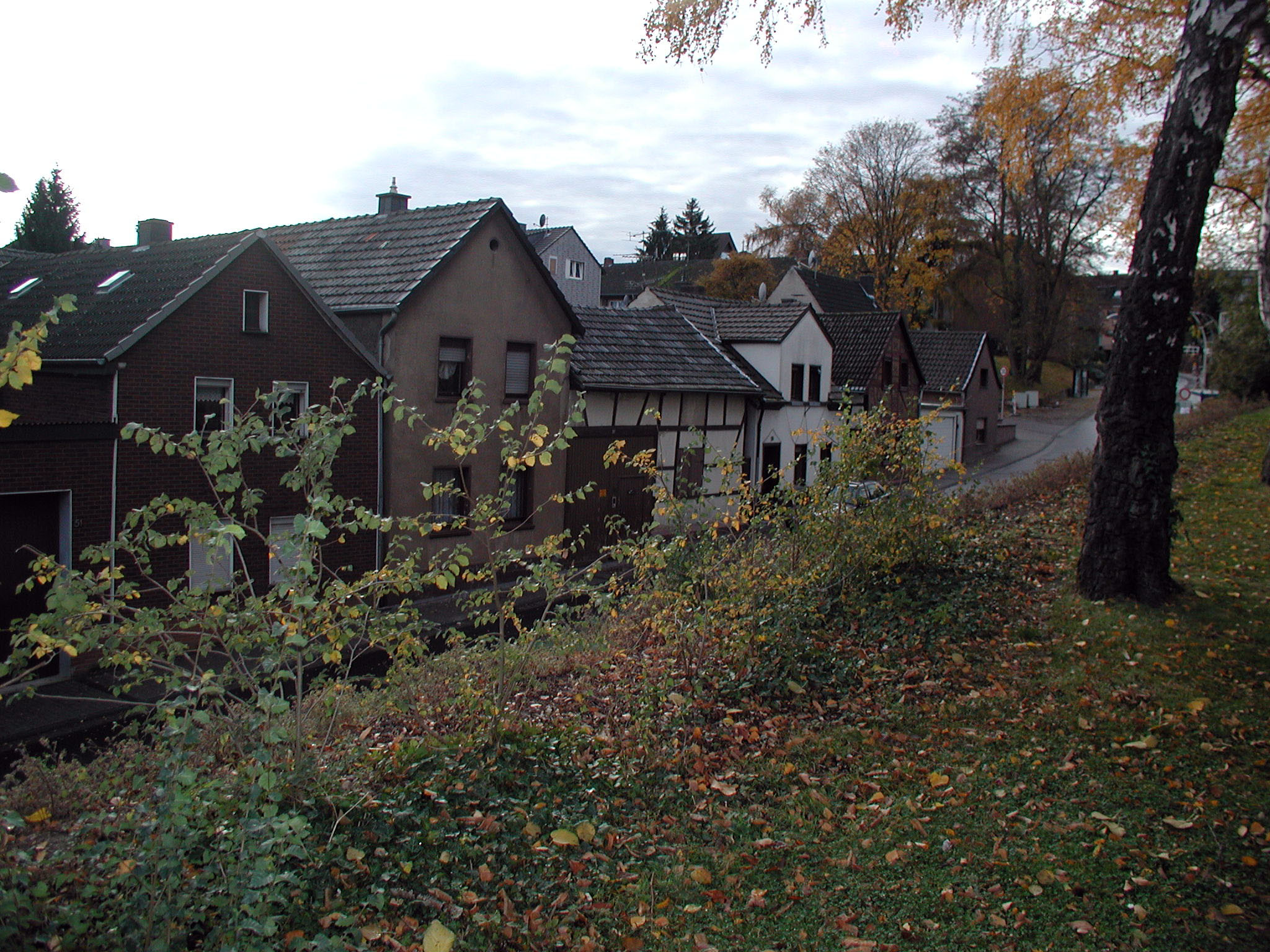 Hürth-Fischenich, Häuserzeile an der Schmittenstraße